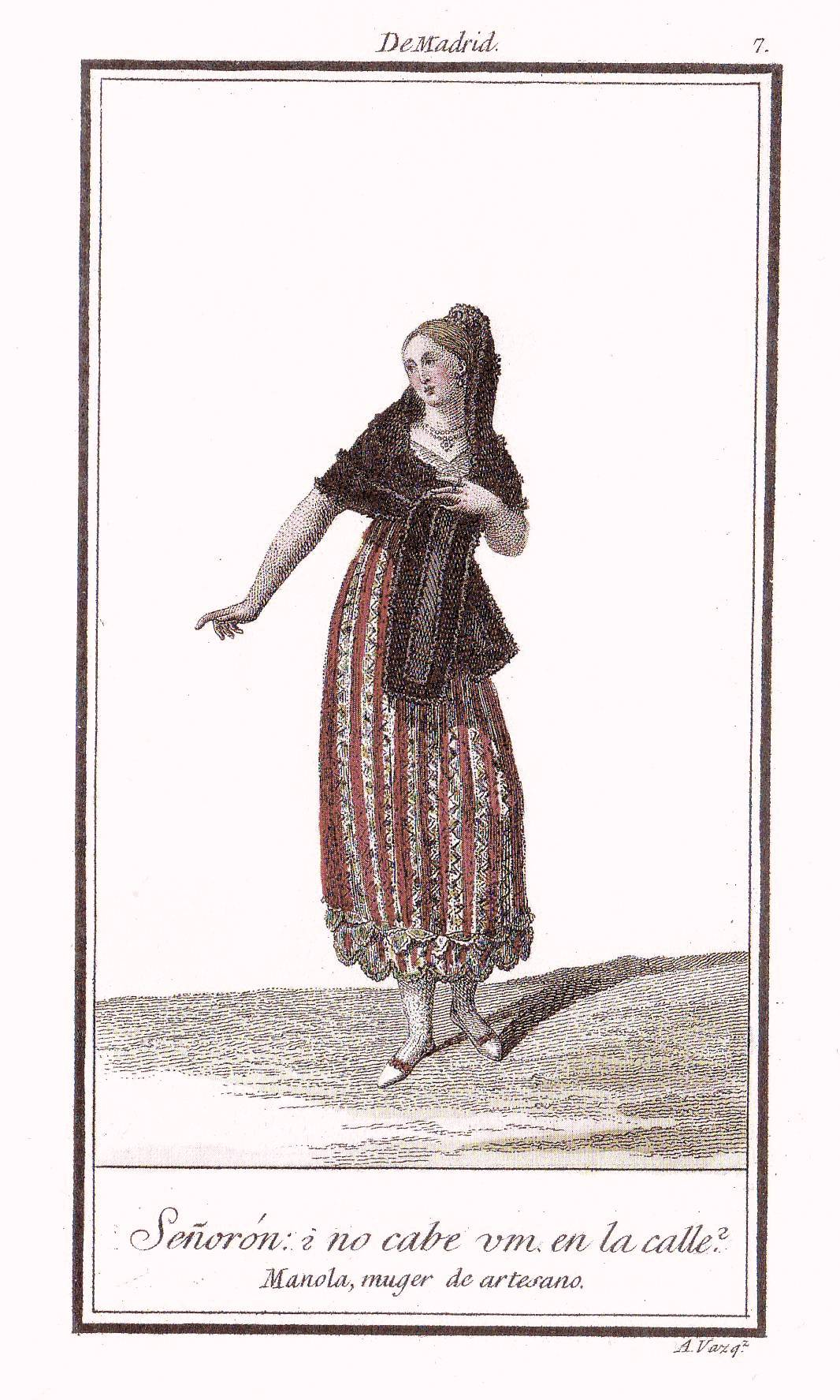 Antonio Rodríguez (1765–1823) Alternative names Antonio RodríguezDescriptionSpanish engraver and painterDate of birth/death 1765 1823 Location of birth/death Valencia ValenciaWork location Madrid. ValenciaAuthority control : Q19839243 VIAF: 99638871 ISNI: 0000 0001 0928 4589 ULAN: 500037980 LCCN: n83012058 GND: 143185209 WorldCat creator QS:P170,Q19839243 (Valencia, 1765 - Madrid, ca. 1825); Grabado y dibujado por Antonio Rodríguez; publicado en 1801. Reproducción facsímil de treinta y ocho estampas, más catorce variantes, de los Trajes de Madrid. Todas iluminadas. Introducción de Juan Carrete Parrondo, Madrid (1989). ISBN 84 78120696.